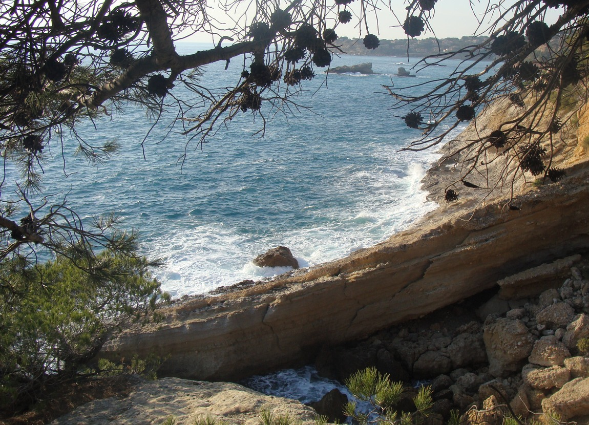 La calanque de l'Escalayole, sur la Côté bleue, commune d'Ensuès-la-Redonne